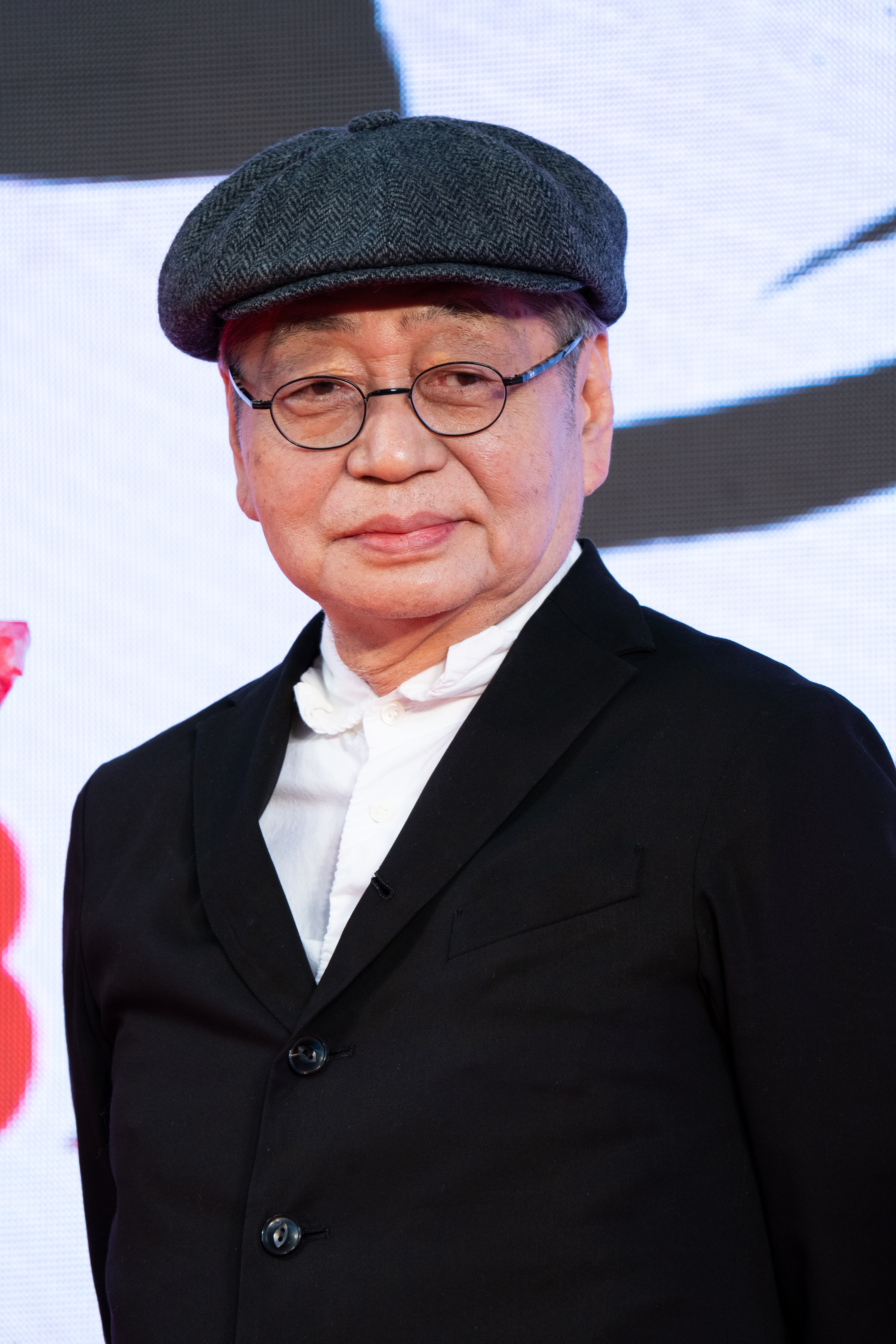 第32回 東京国際映画祭 オープニングセレモニー 細野晴臣 (NO SMOKING)